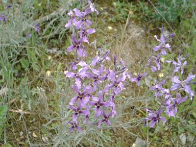 Matthiola fruticulosa plant